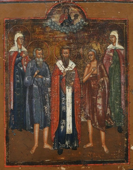 Daria (links), Conon der Gärtner, Basilius der Große, Maria von Ägypten und Synkletike, darüber der segnende Christus.